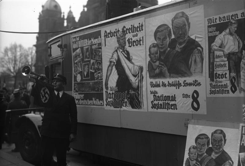 Nationalsozialistische Wahlpropaganda in Berlin 24.04.1932 Wahl zum preußischen Landtag